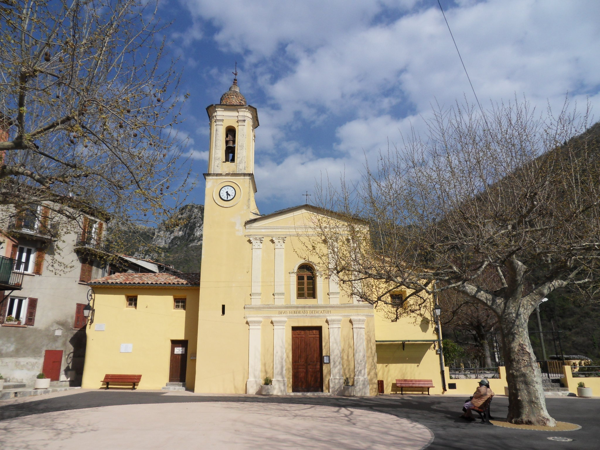 Touët-de-L'Escarène. L'église saint-Martin